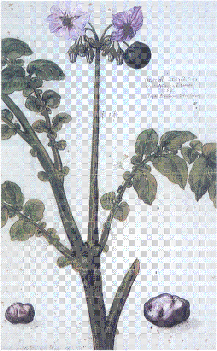 Aquarelle représentant un rameau fleuri de pomme de terre (Solanum tuberosum) envoyé en 1588 par Philippe de Sivry à Charles de l'Écluse (Clusius)